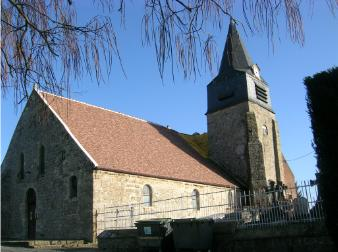 Photographie de l'église de Chéry-les-Pouilly (02), prise en mars 2007.